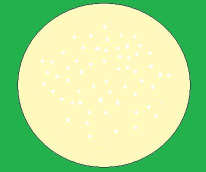 koloni putih